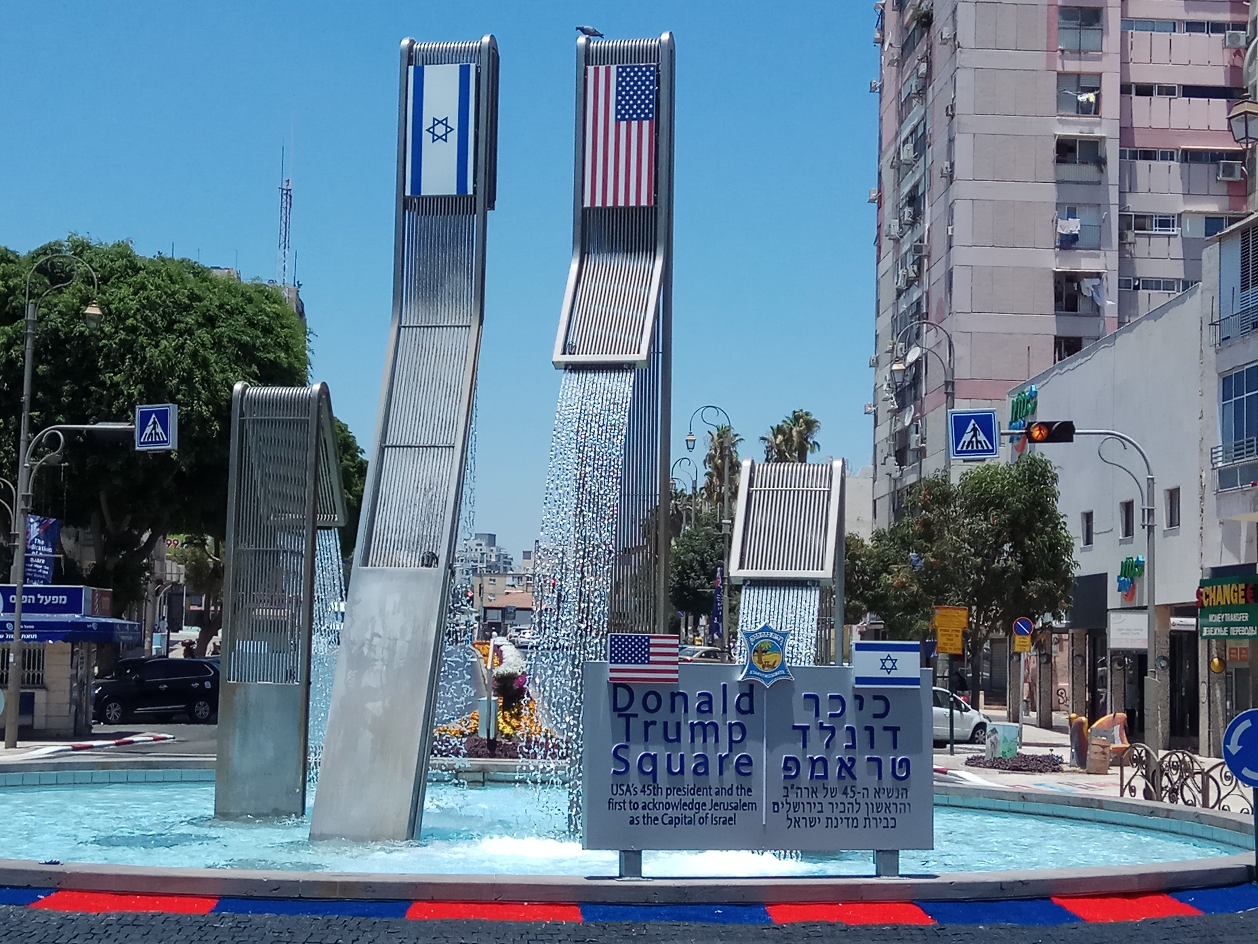 כיכר על שם דונלד טראמפ ברחוב חיים עוזר בפתח תקווה